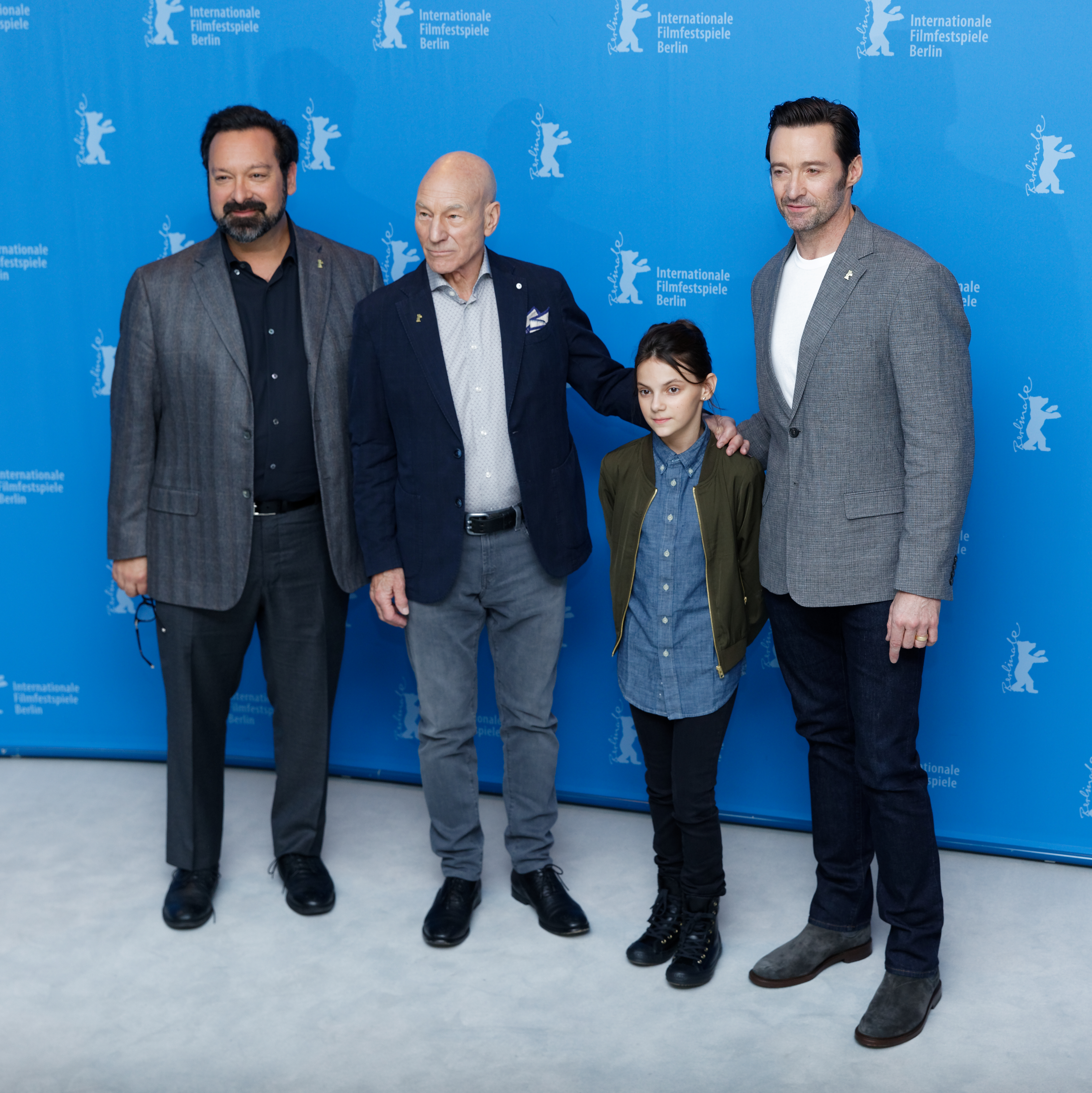 James Mangold mit Cast beim Photo Call zu Logan bei der Berlinale 2017